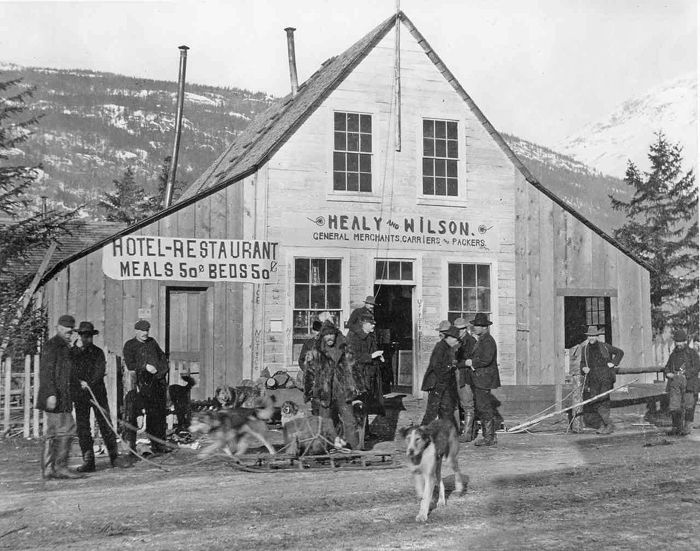 Торговельний пост Healy&Wilson у Даї (Аляска) у часи золотої лихоманки. 1890-ті роки.